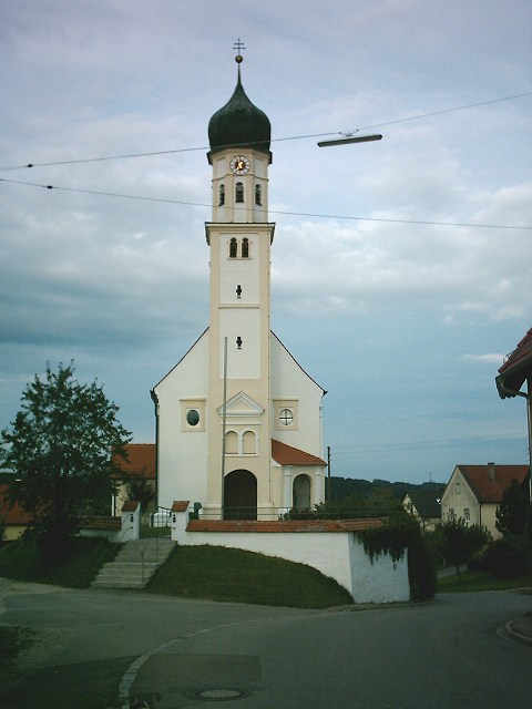 Kath. St. Georgs-Kirche in Unterschöneberg // (West-Ansicht)